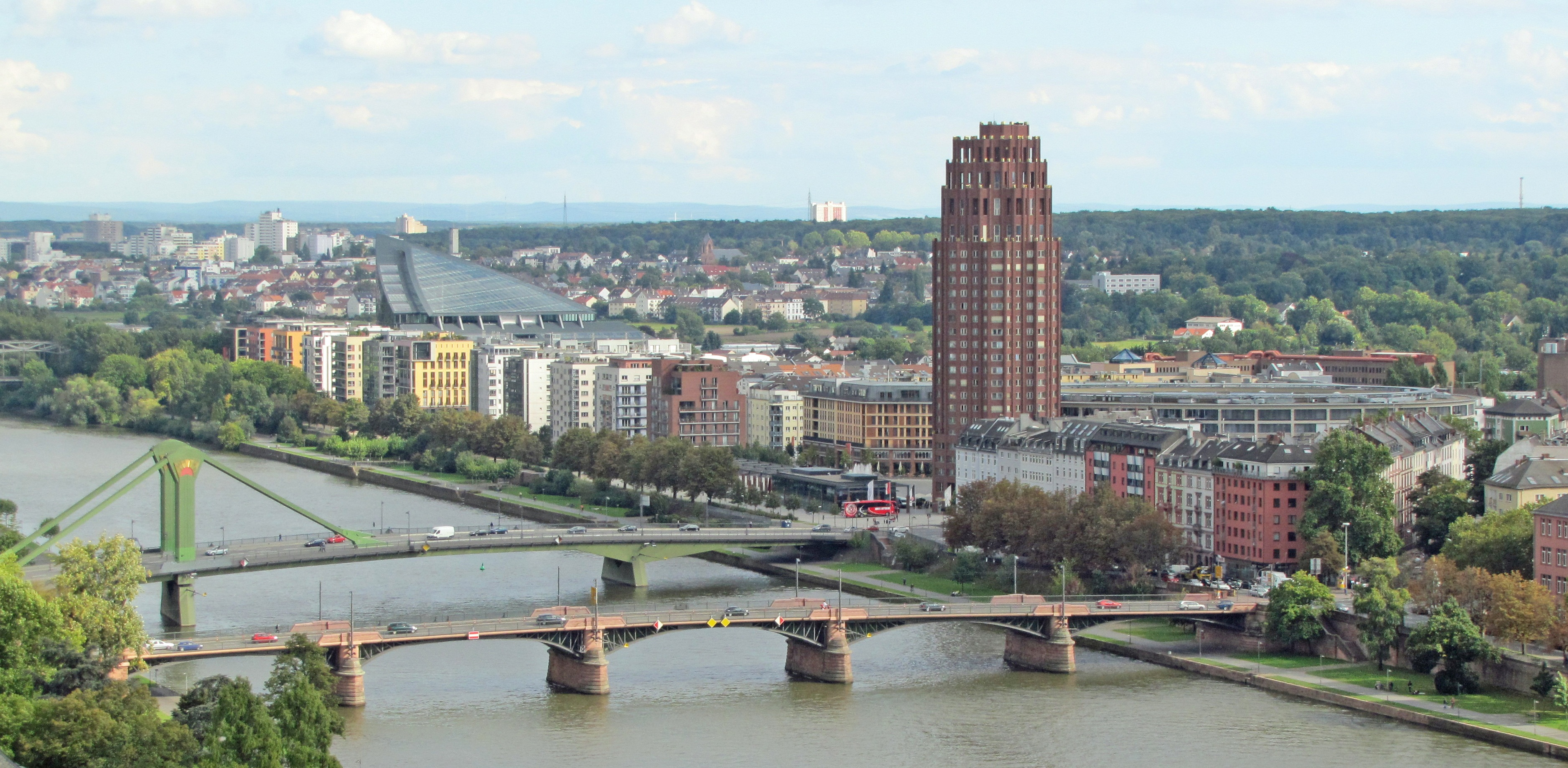 Blick vom Domturm (2010), auf Main und Frankfurt-Sachsenhausen mit Deutschherrnviertel, Flößer- und Ignatz-Bubis-Bruecke.